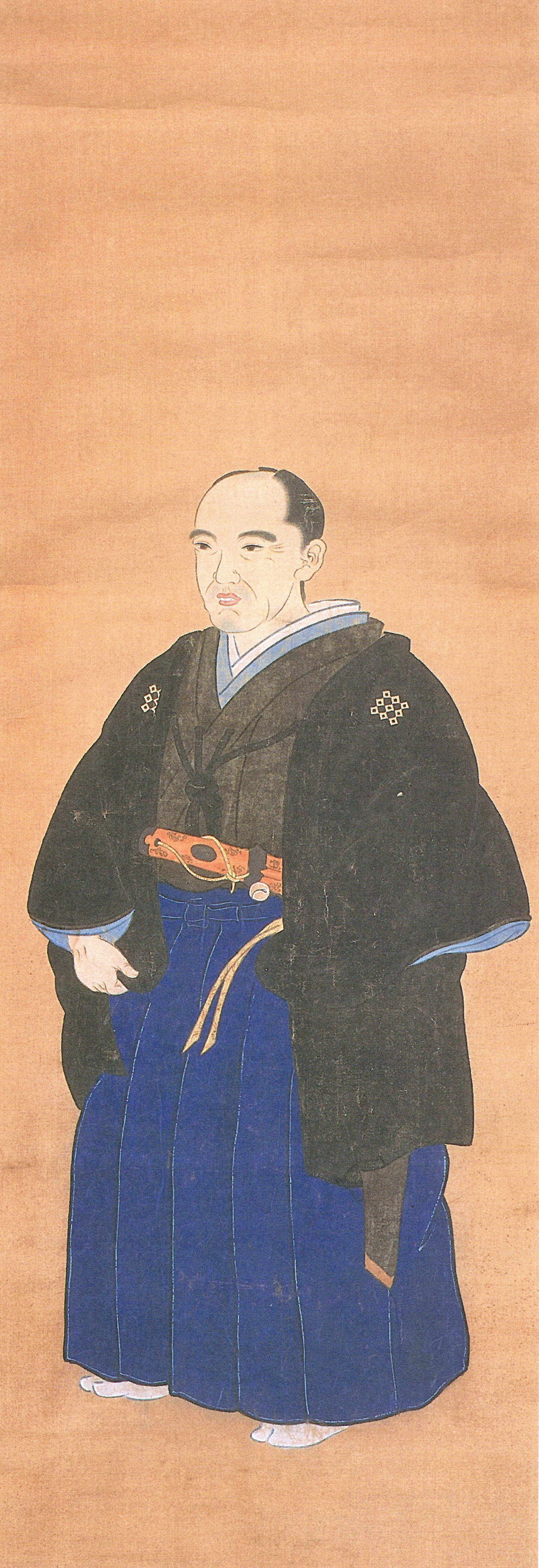 松平(本庄)宗秀の肖像。